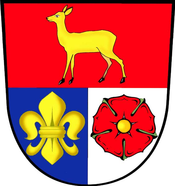 Znak obce Srnín